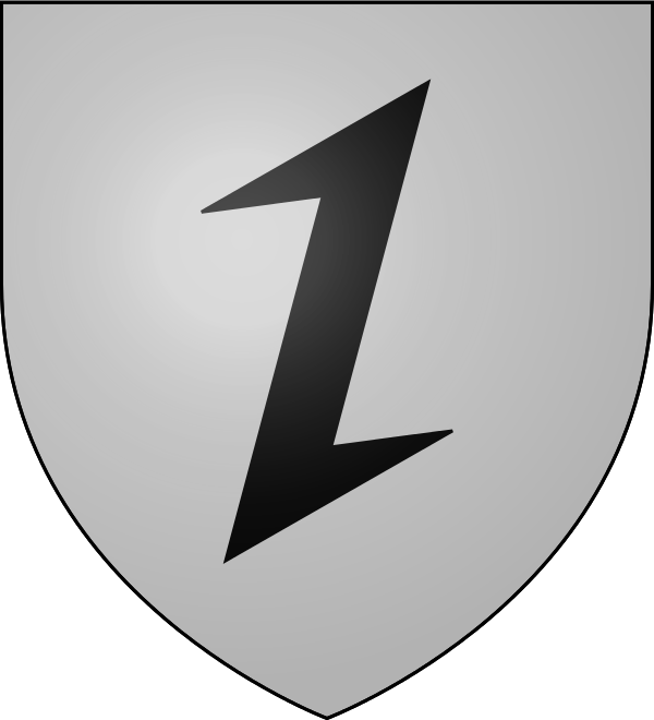 Blason da la Commune de Cazalrenoux